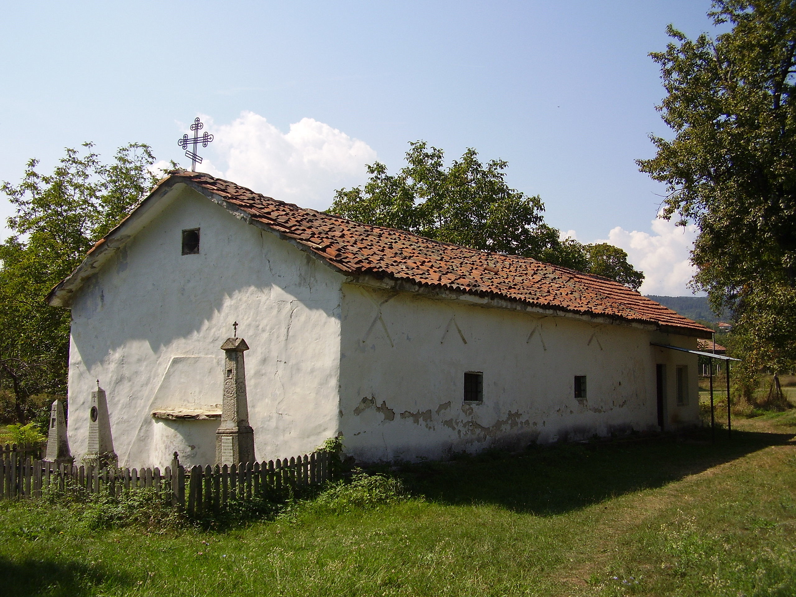 Възрожденска църква "Св.Теодор Тирон" - с.Соволяно (1834)